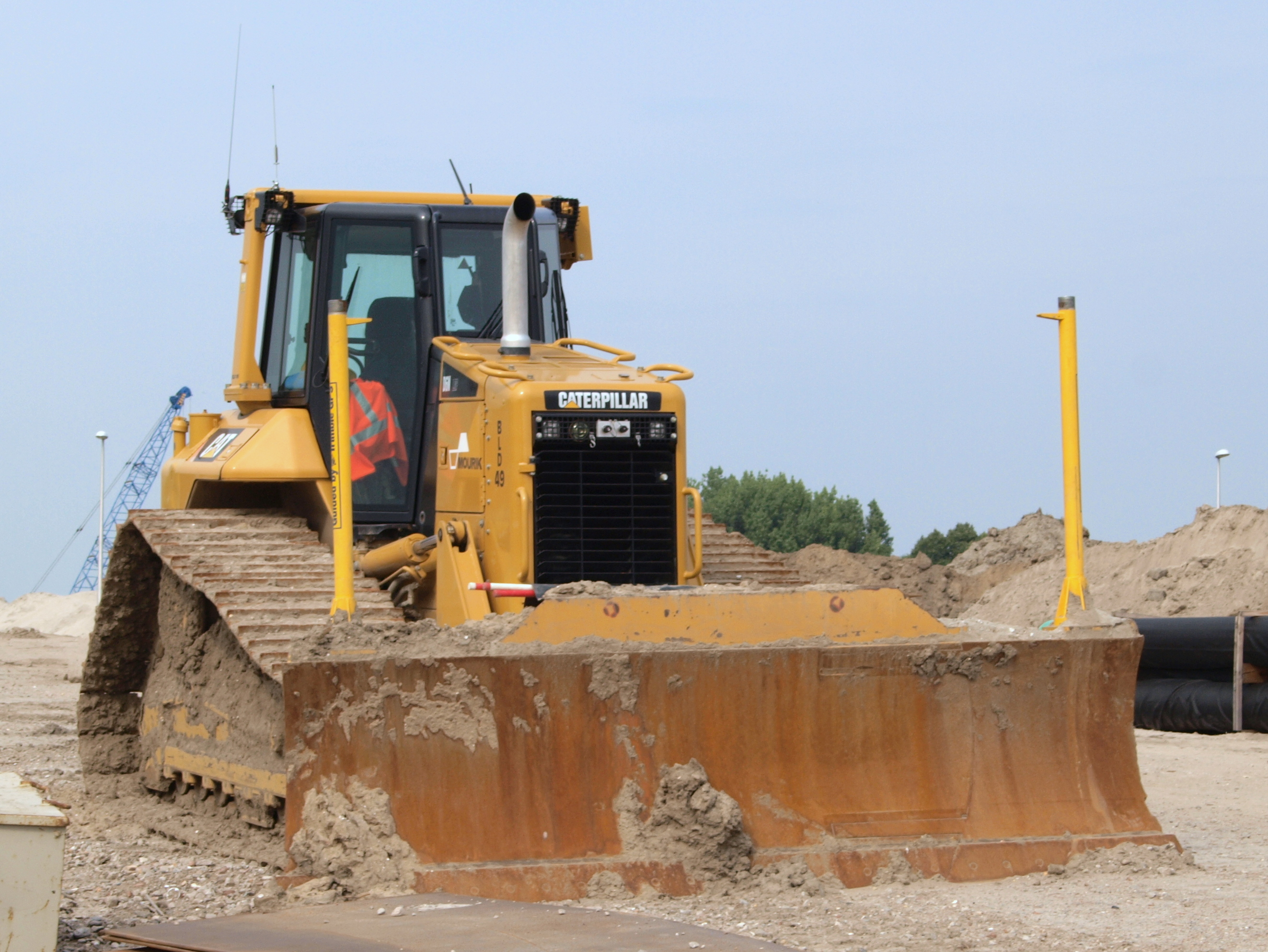 Caterpillar D6N